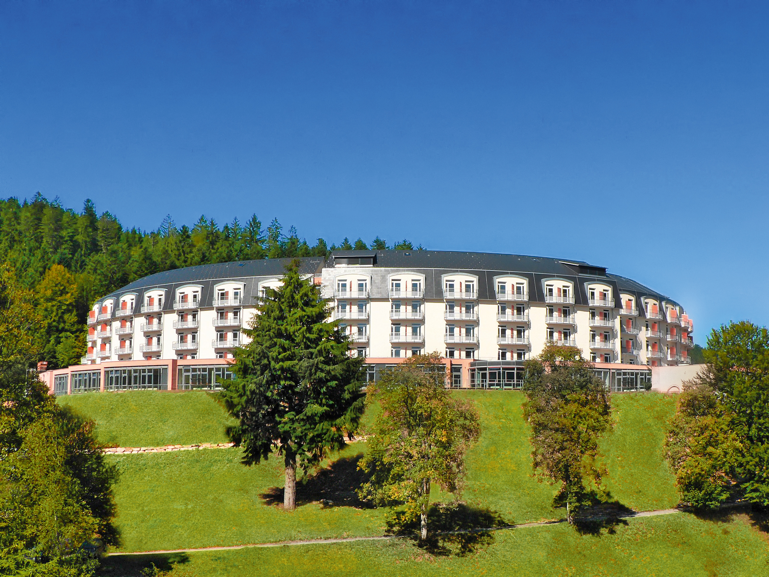 Blick auf die Wehrawald-Klinik in Todtmoos